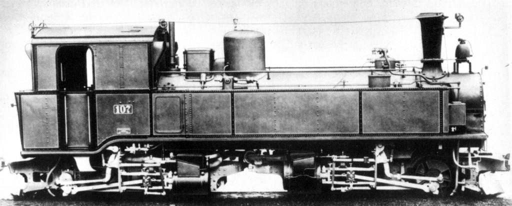 Kgl. Sächs. Sts. E. B. Gattung IV K